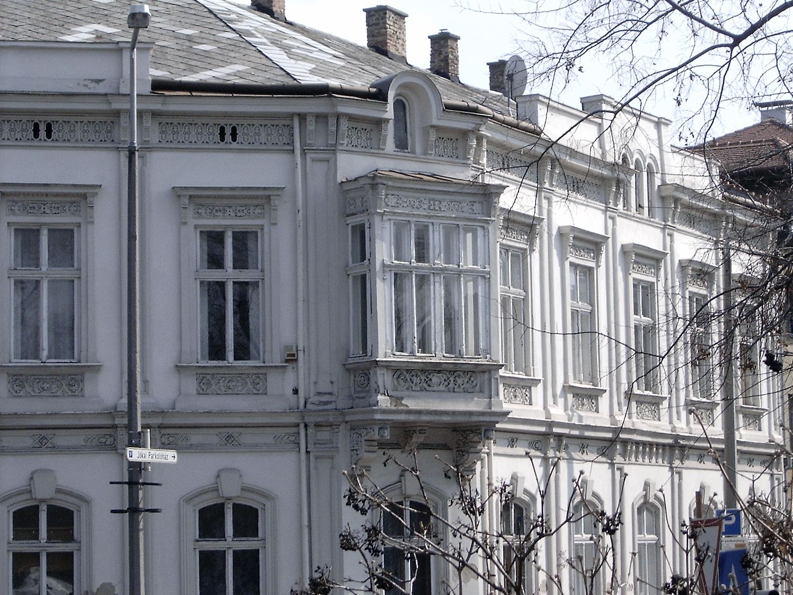 Jókai utca-Zechmeister utca sarok Győr